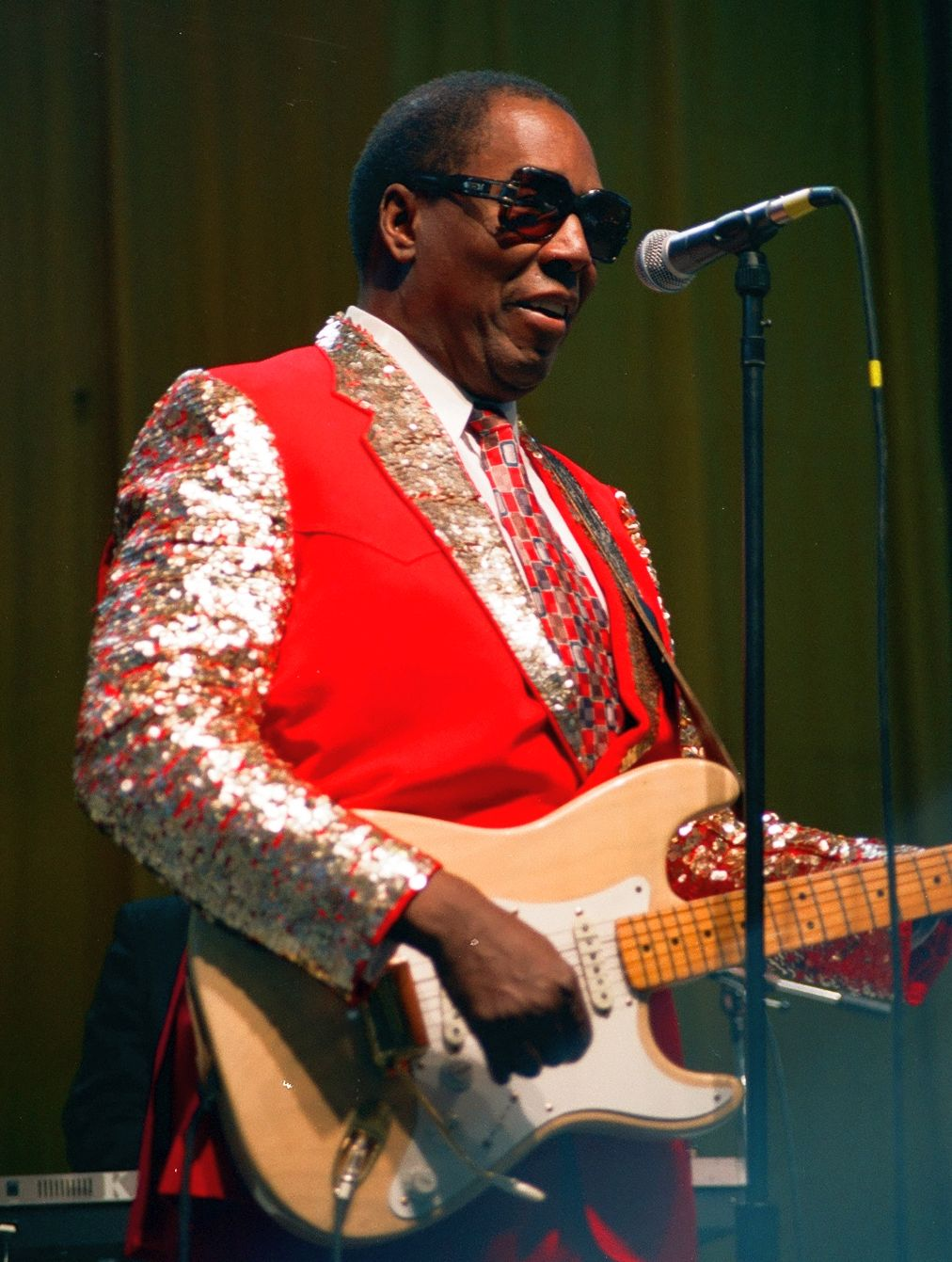 Baltimore M.D. 1995